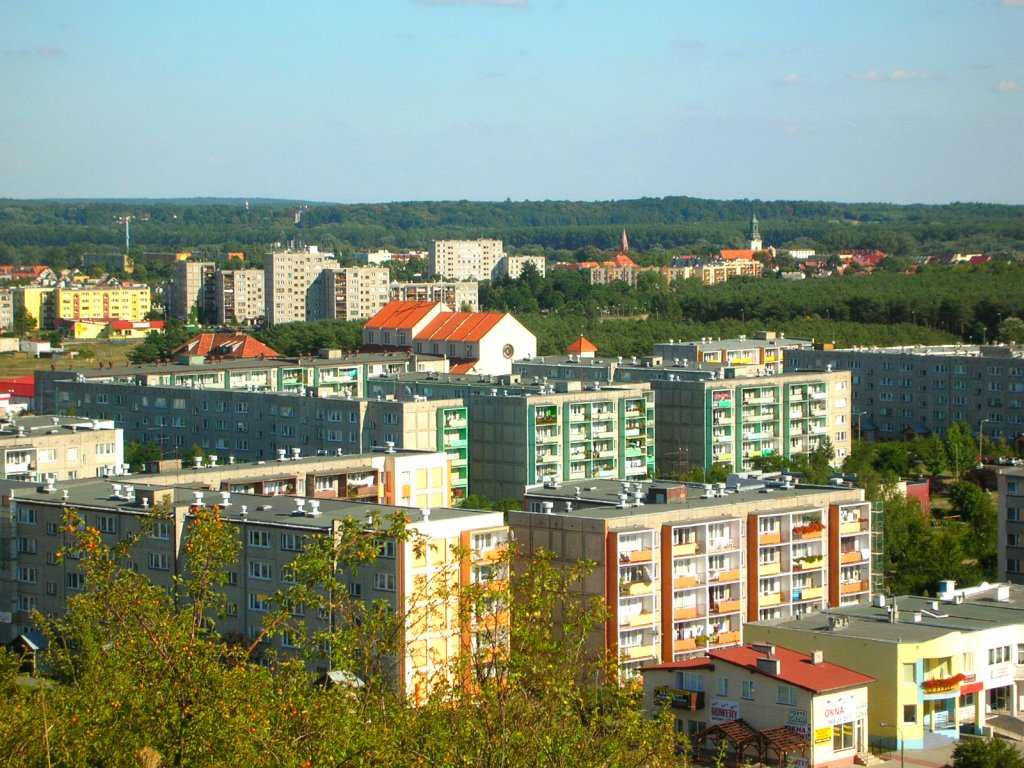 Widok z Góry Szybowników w Fordonie